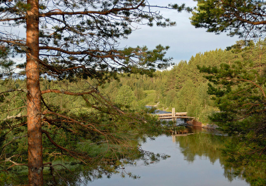 Вяла недалеко от истока